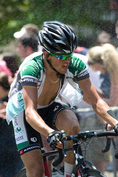 Éric Boily Pendant une course a philadelphie